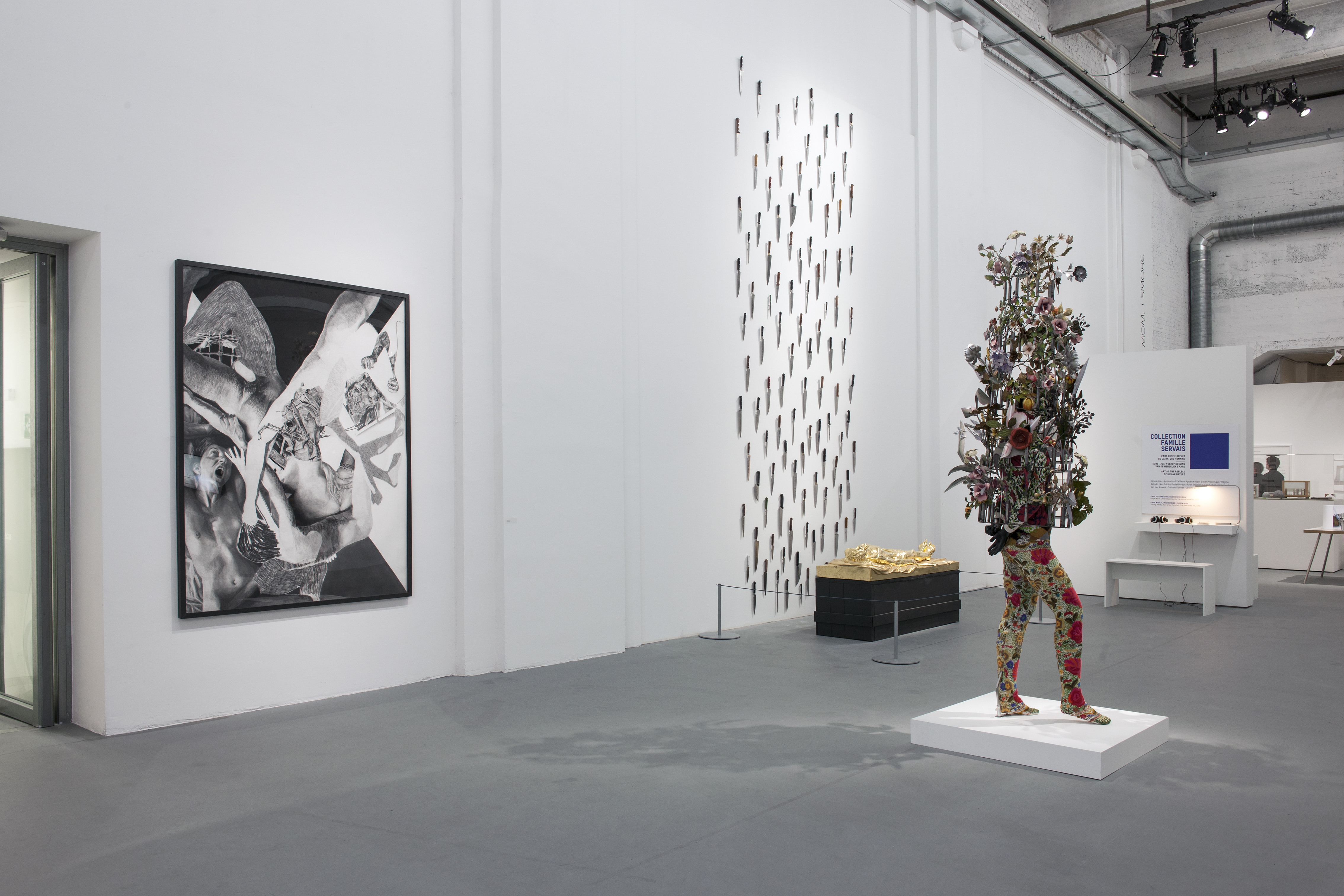 Exposition Private Choice